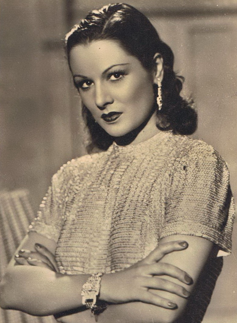 Italian actress Luisa Garella